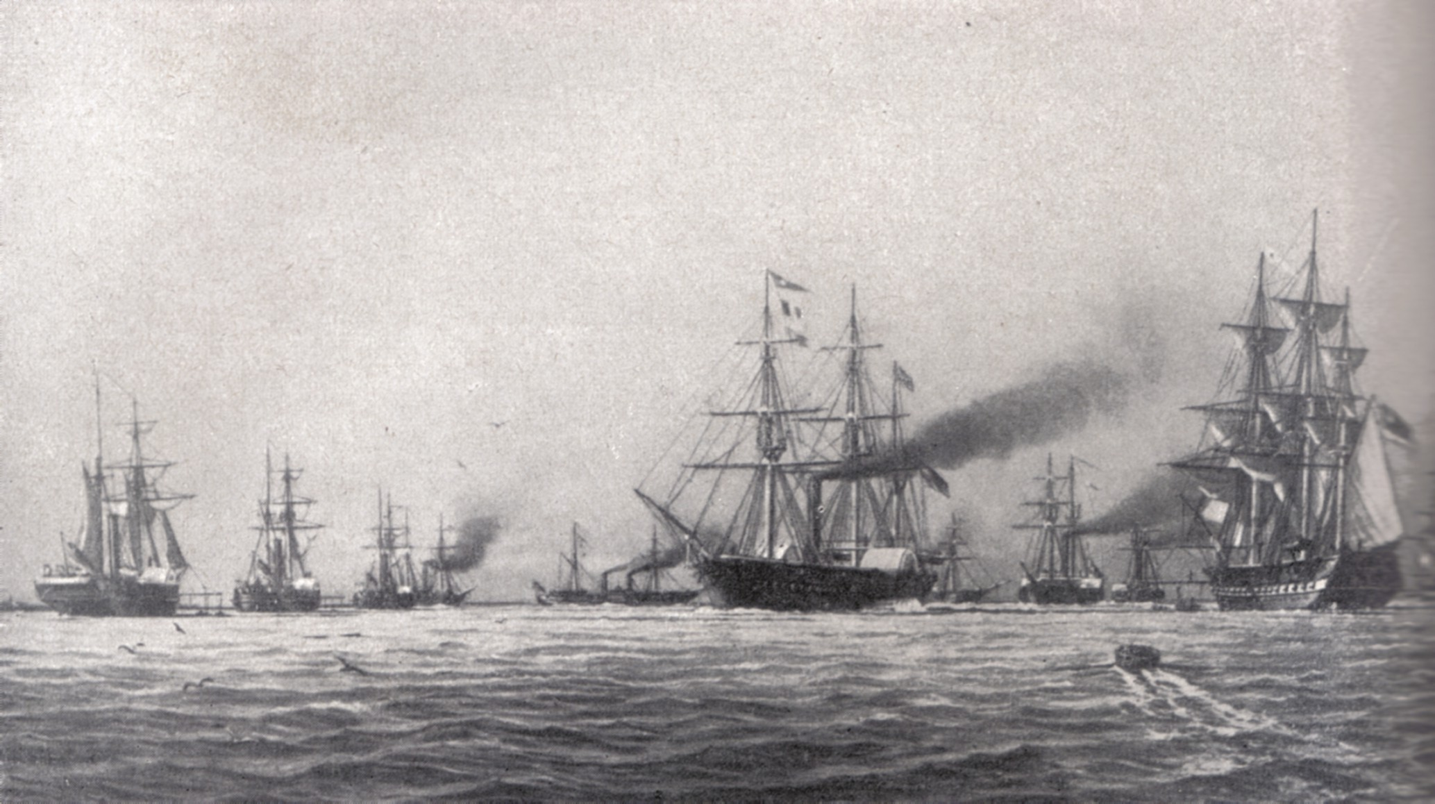 Reichsflotte des Deutschen Bundes 1849, unbekannter Maler